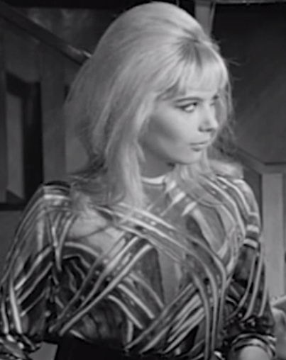 Screenshot dal film Un mostro e mezzo (1964)